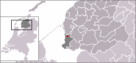 Kaart met de locatie van Workum, gemaakt uit sjabloon van Wikipedia-gebruiker Mtcv